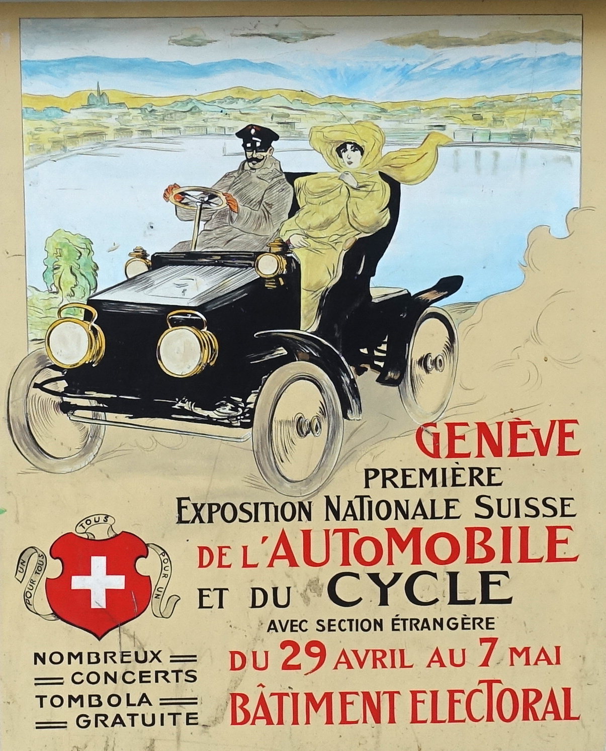 Reproduction de l'affiche "Exposition nationale suisse de l'automobile et du cycle", Genève, 1905. Passage de Montbrillant, arrêt des tramways.